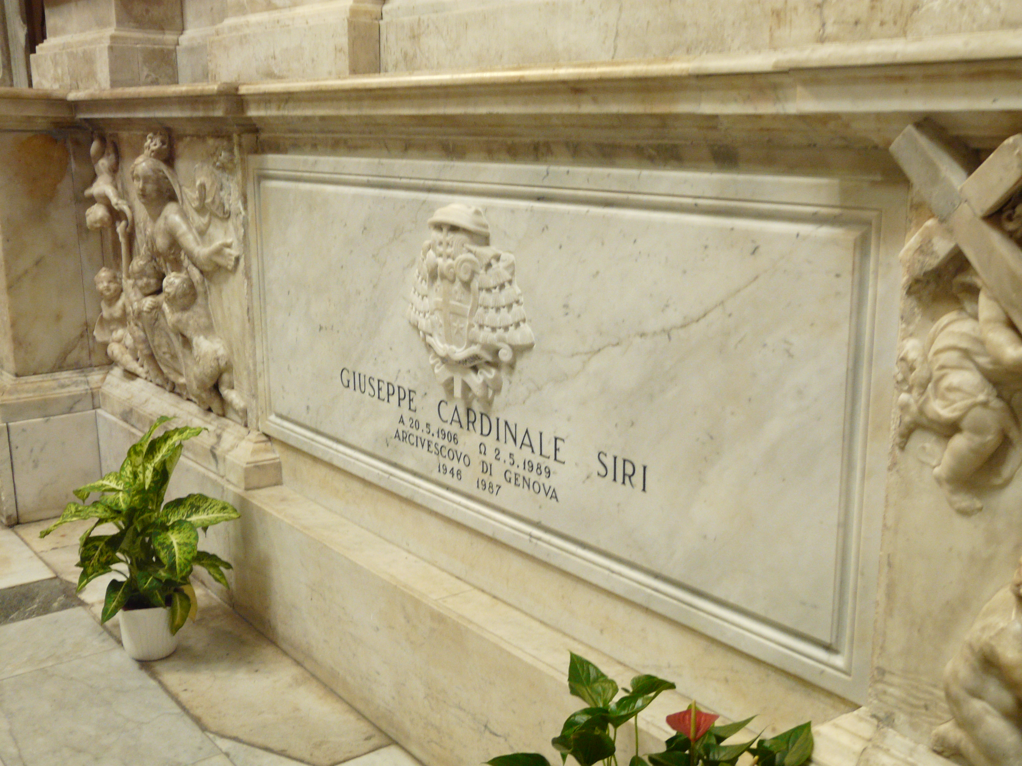 Tomba del cardinal Giuseppe Siri, Cattedrale di San Lorenzo, Genova, Liguria, Italia